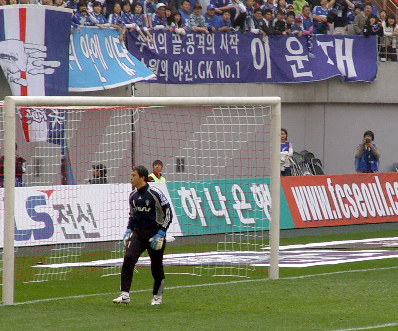 이운재. 서울월드컵경기장, 서울 대 수원 경기 중.